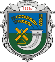 Герб Криворізького району